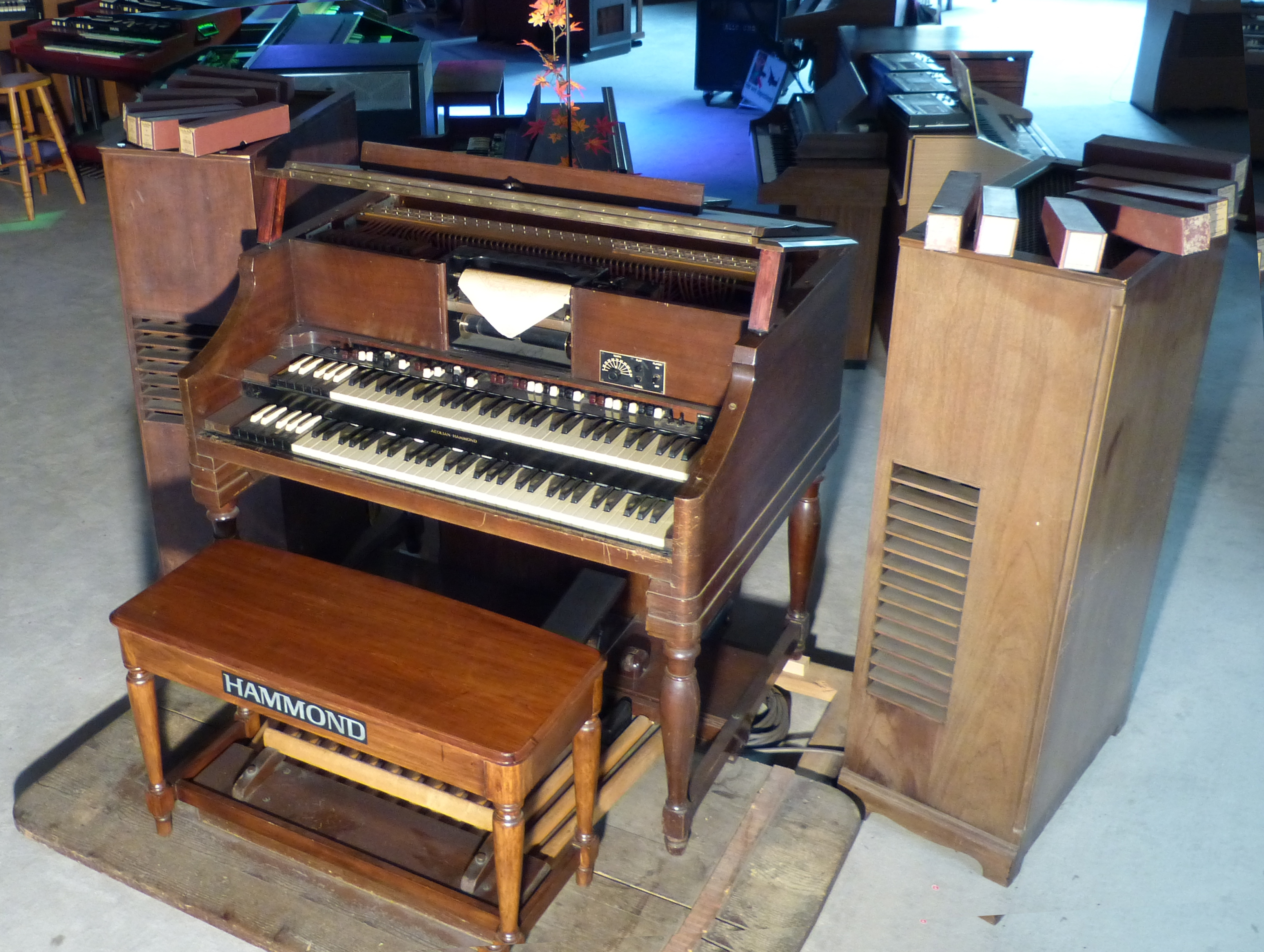 Hammond BA Player Organ aus dem Jahre 1938